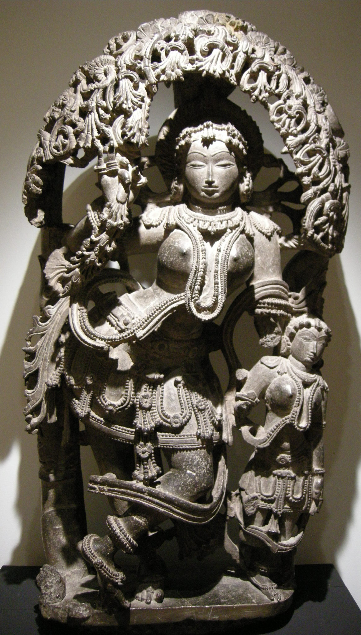 India, tre dee, salabhanjika, periodo hoysala 1150-1200 da Karnataka